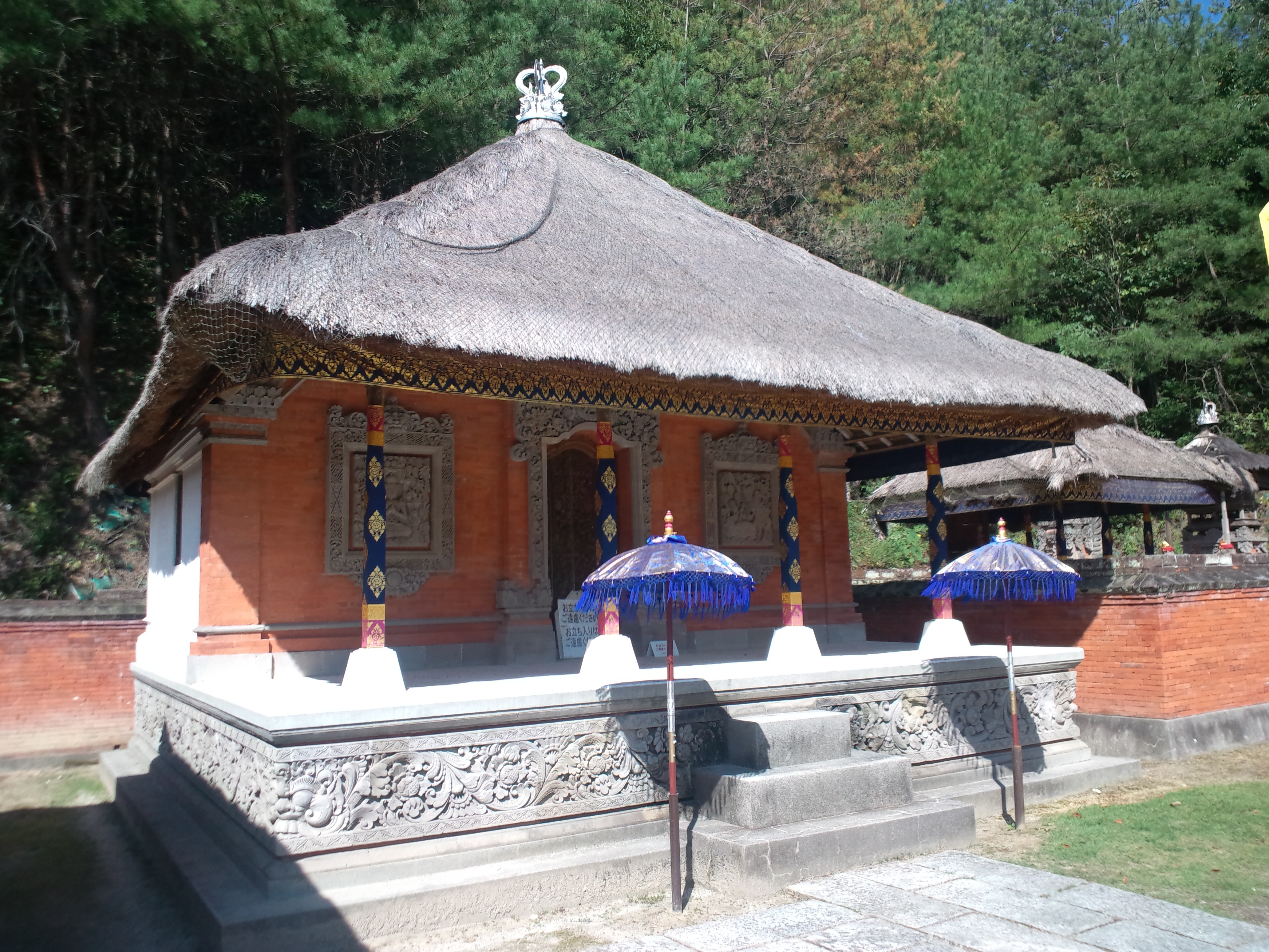 リトルワールド バリ島貴族の家